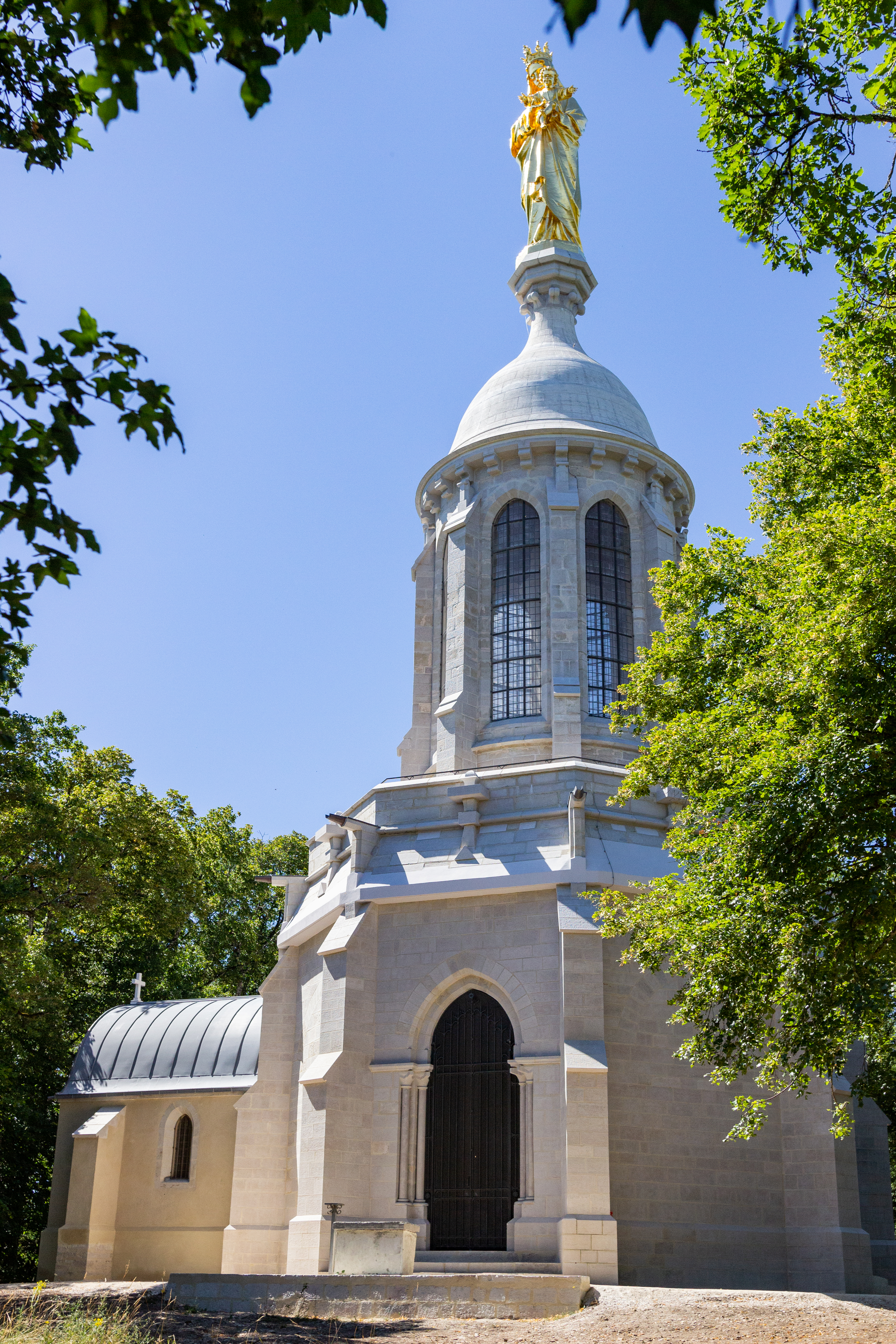 Notre Dame d’Étang à l'été 2020 après la fin de la restauration.